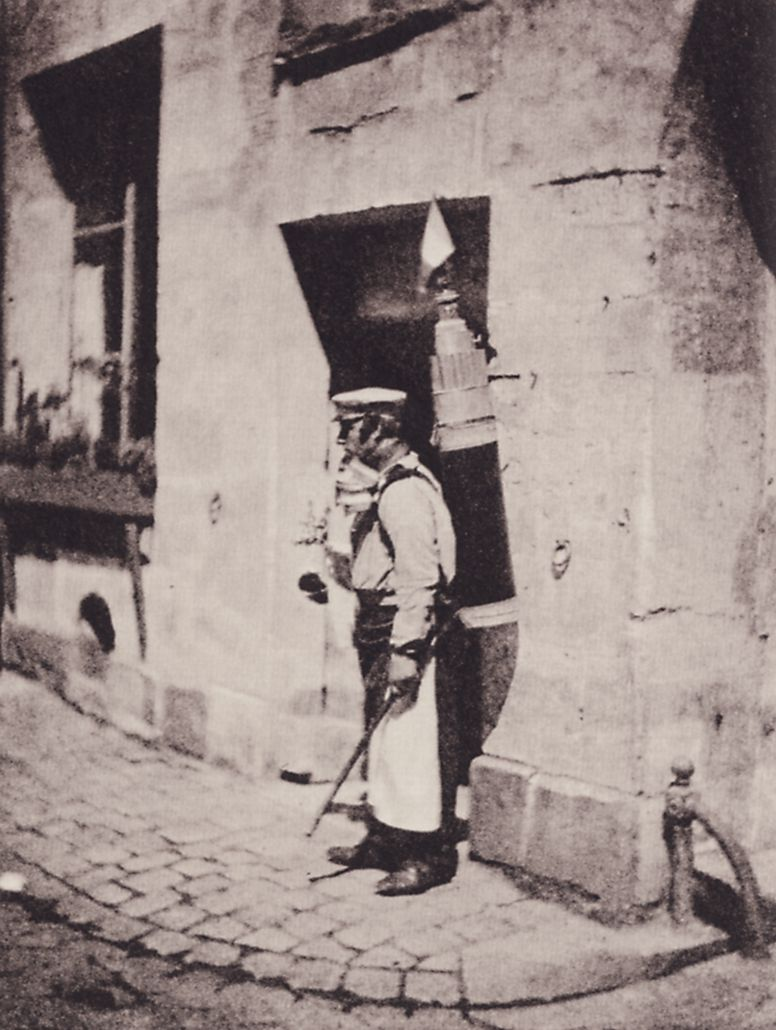 Nègre, Charles: Wasserspender